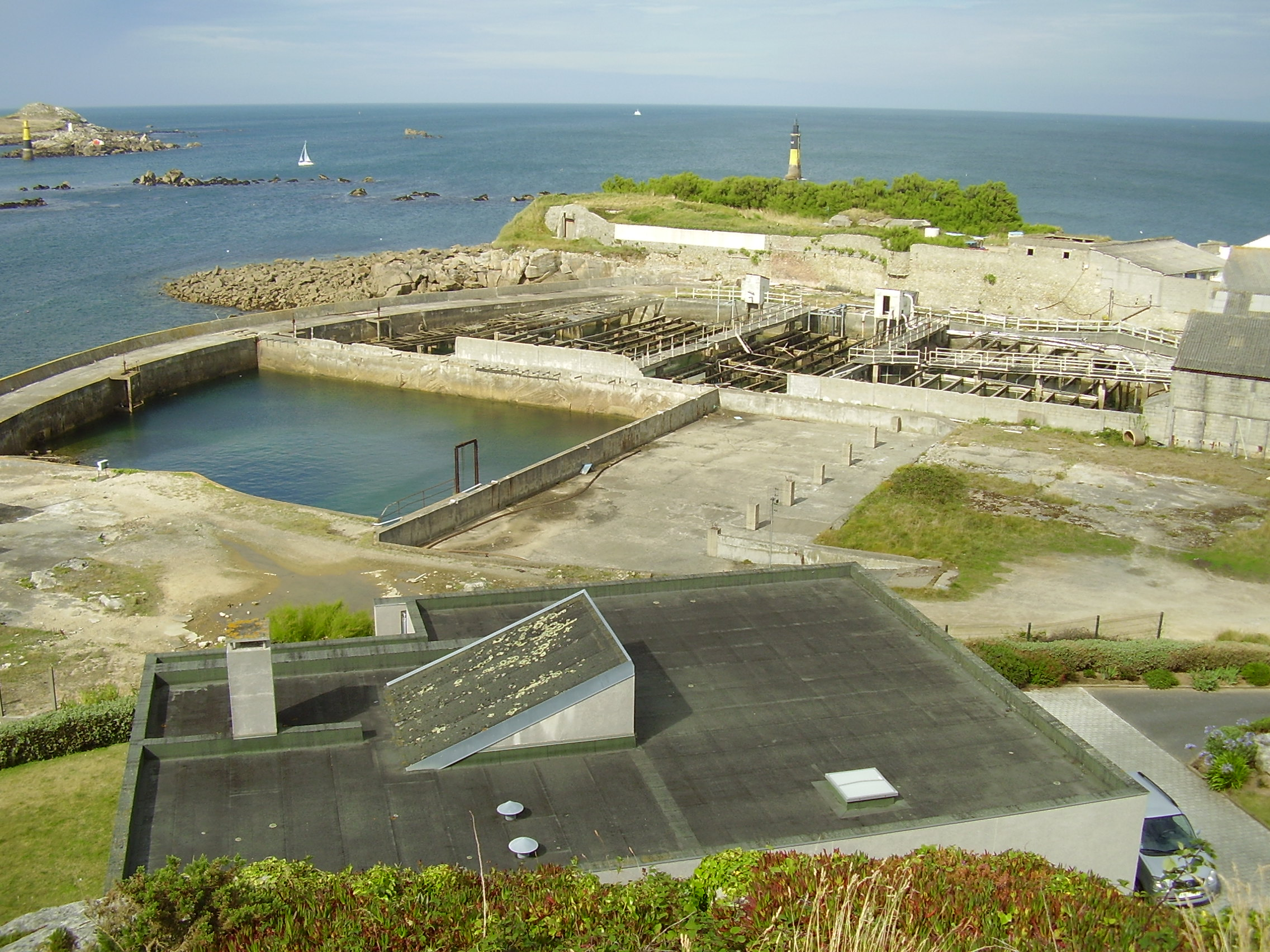 Roscoff, Bretagne; Frankreich